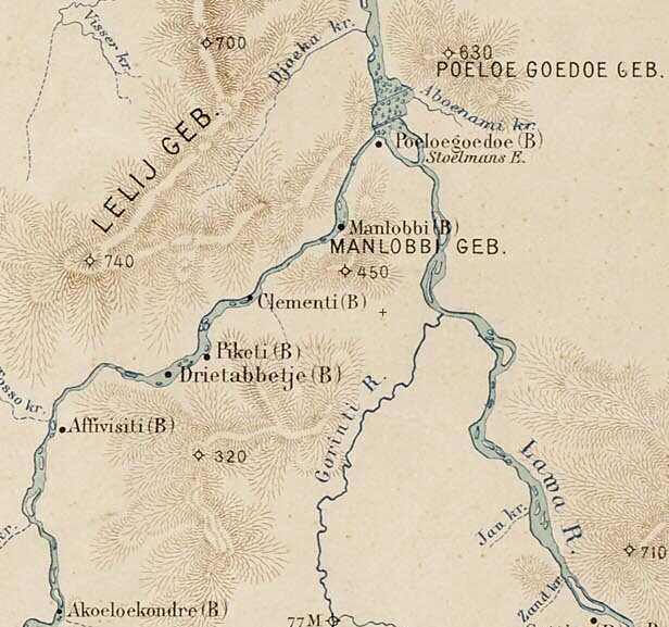 Tapanahoni__-_Drietabbetje__-_Kaart_1913 Publisher Den Haag: Lith. J. Smulders Pub. year 1913 Survey date 1898-1911 Scale 1:800.000 Coordinates W 058°21' - W 053°40' / N 006°26' - N 001°20' KIT Library - Available: KK 119-02-05 KZ (Not for loan)